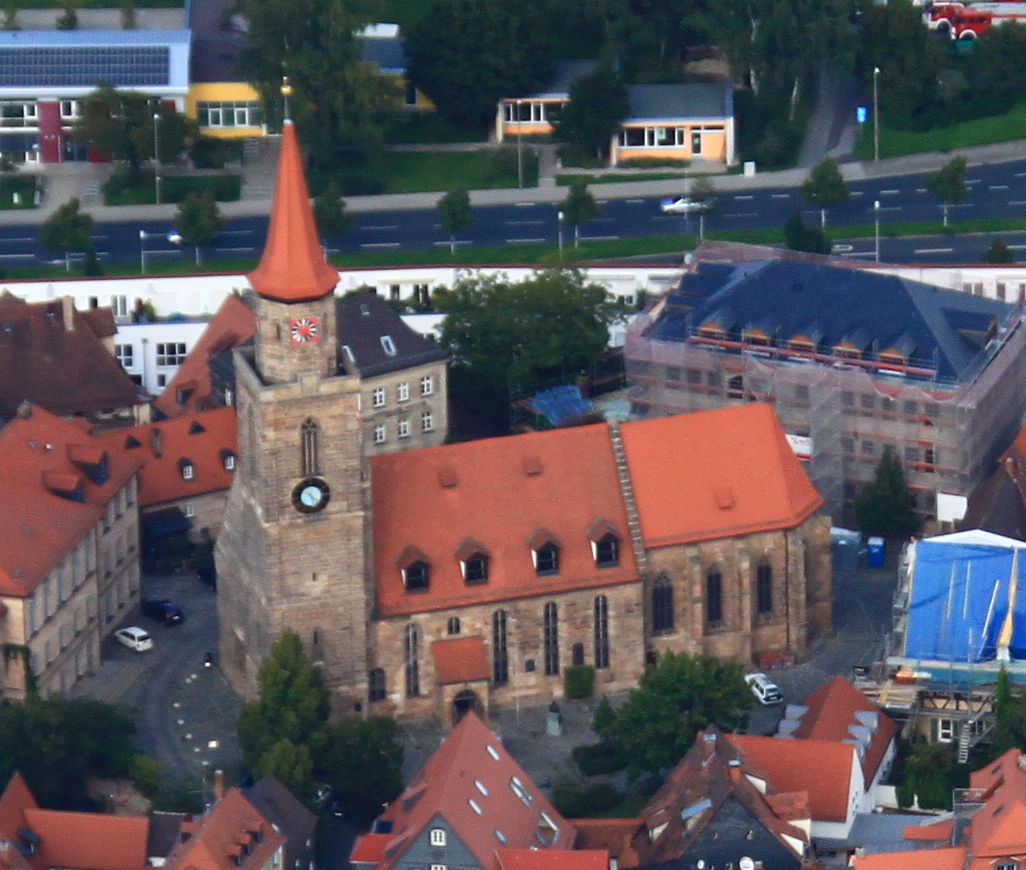 Stadtpfarrkirche Sankt Michael am Kirchenplatz 4 in der Fürther Altstadt (Südseite)